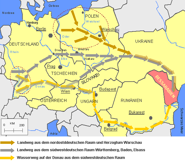 Bessarabia Germans, Einwanderung aus Deutschland nach Bessarabien mit Wanderwegen